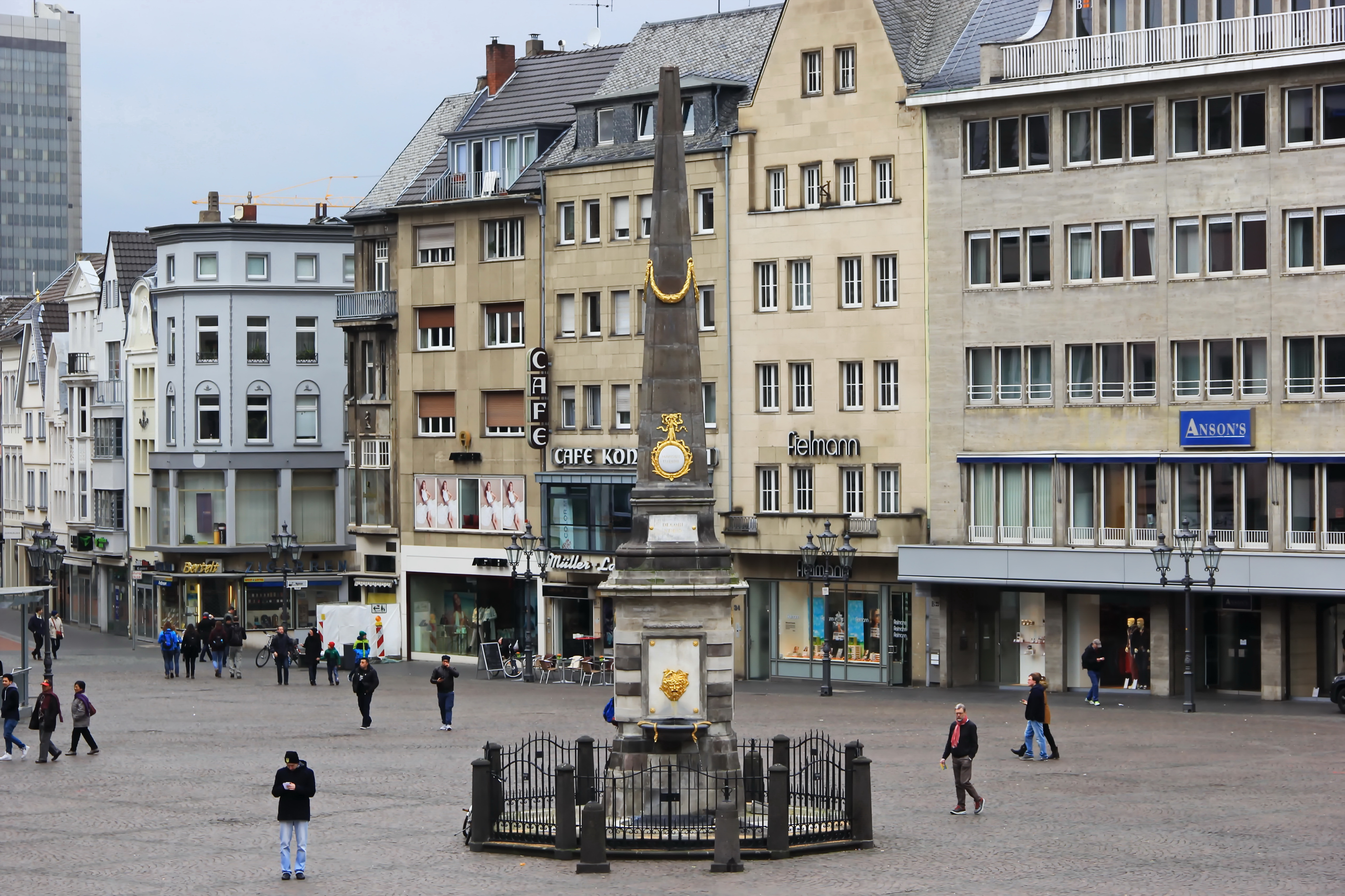 Fontainen-Obelisk auf dem Bonner Marktplatz.